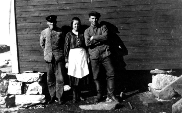 Rorbukokke og to fiskere i Nordøyan ca 1923-25. Ukjent fotograf. Unknown source: "Kystmuseet i Nord-Trøndelag"!